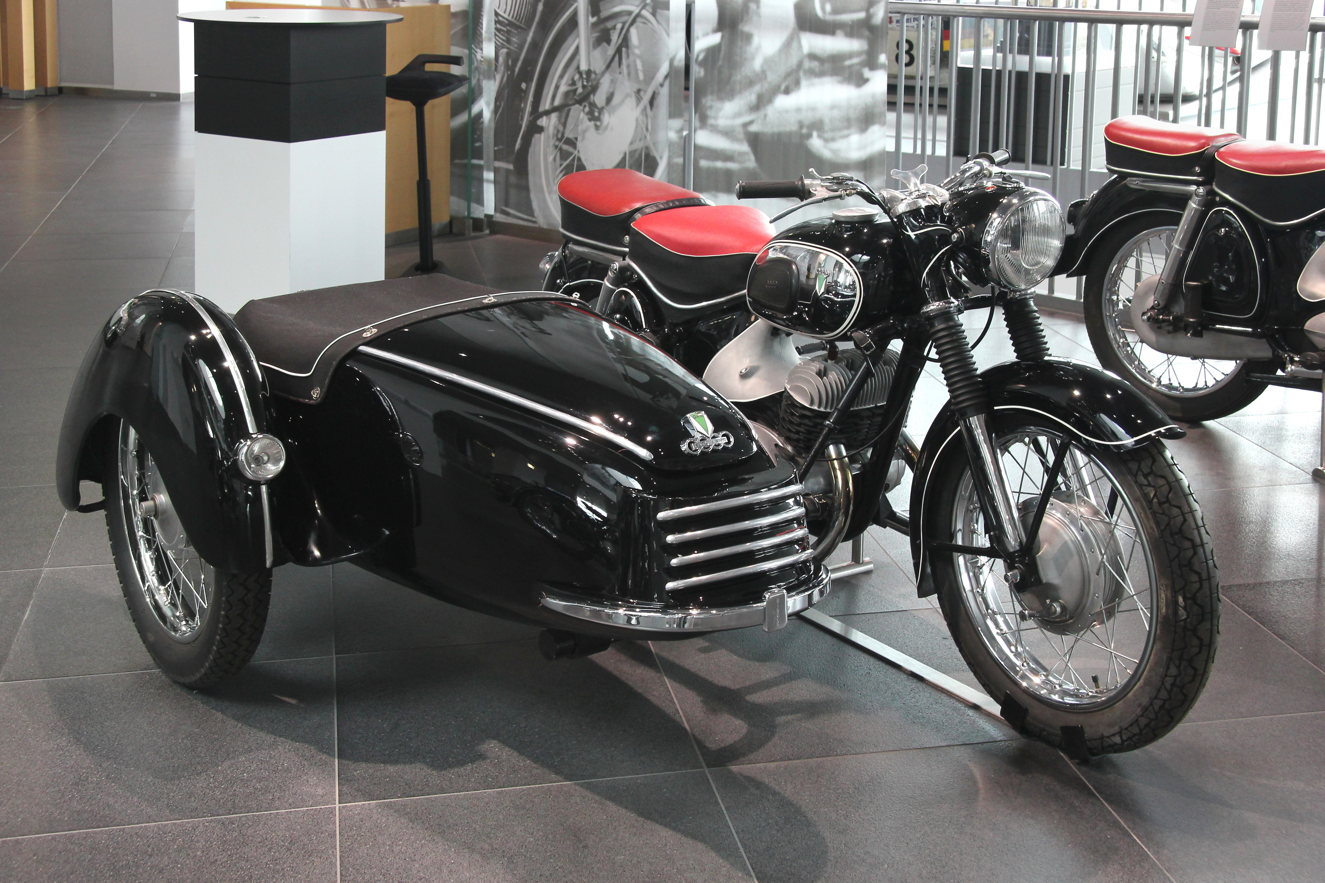 DKW RT 350 S mit Binder-Seitenwagen, Zweizylinder-Zweitaktmotor, 18,5 PS bei 5000/min, Baujahr 1956. 5290 Stück von 1955 bis 1956 gebaut